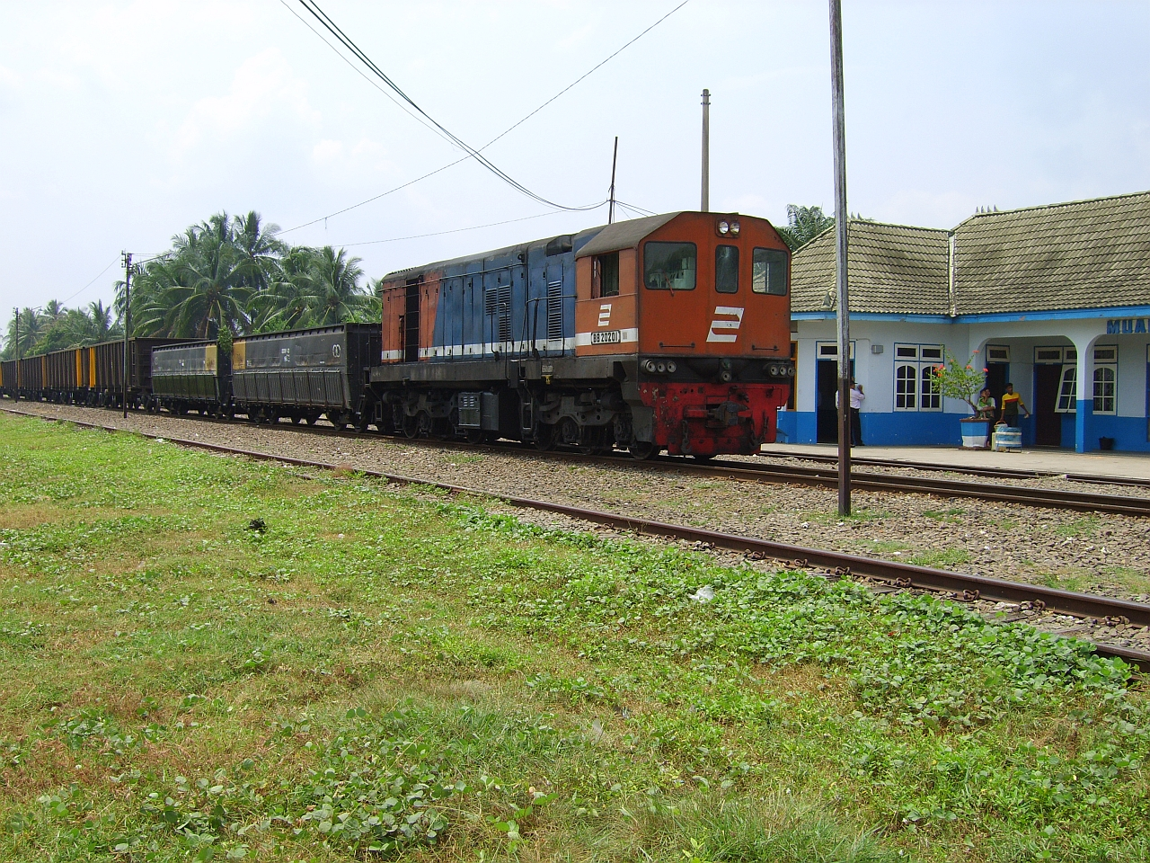 Ptkabb202 (202 01 A)